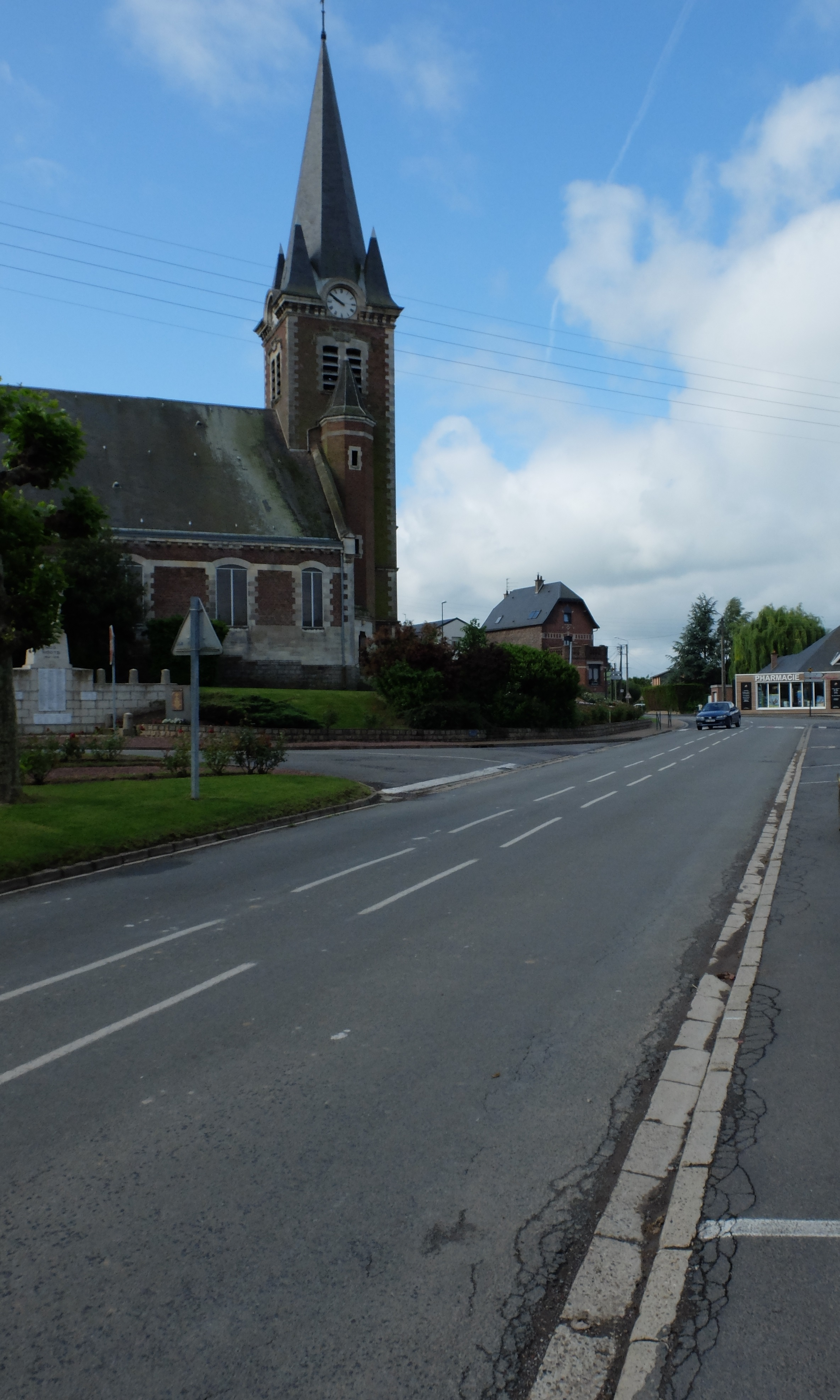 Vue de la place des anciens combattants de Bourlon, avec notamment son église.